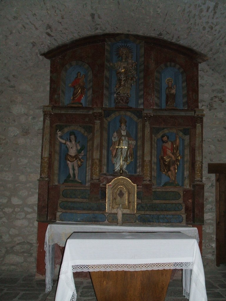 Casteil (Pyrénées-Orientales, France) : église paroissiale Saint-Martin (XVIIème siècle) : retable du maître-autel (XVIIème-XVIIIème siècle)